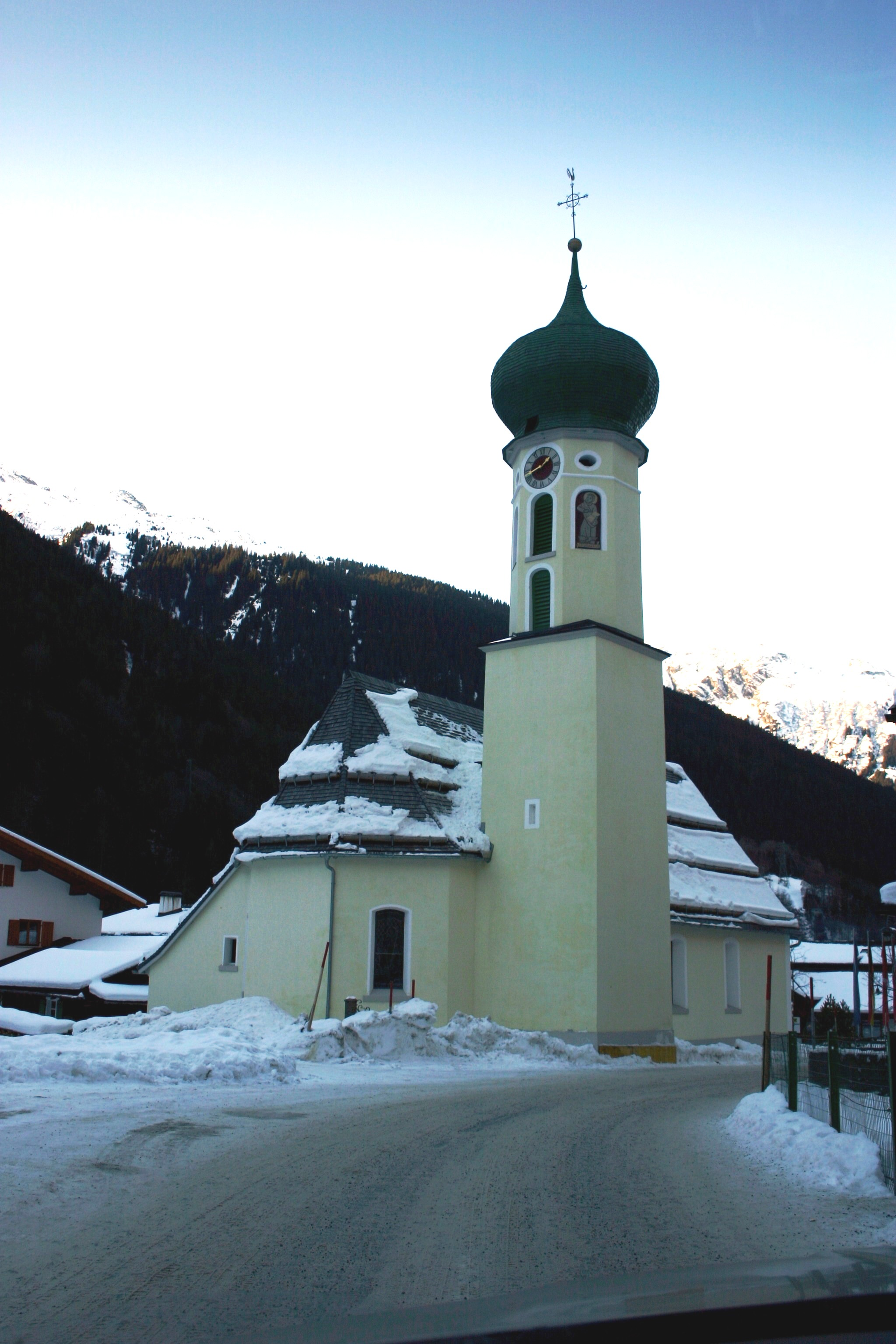 Kierch zu Partenen.